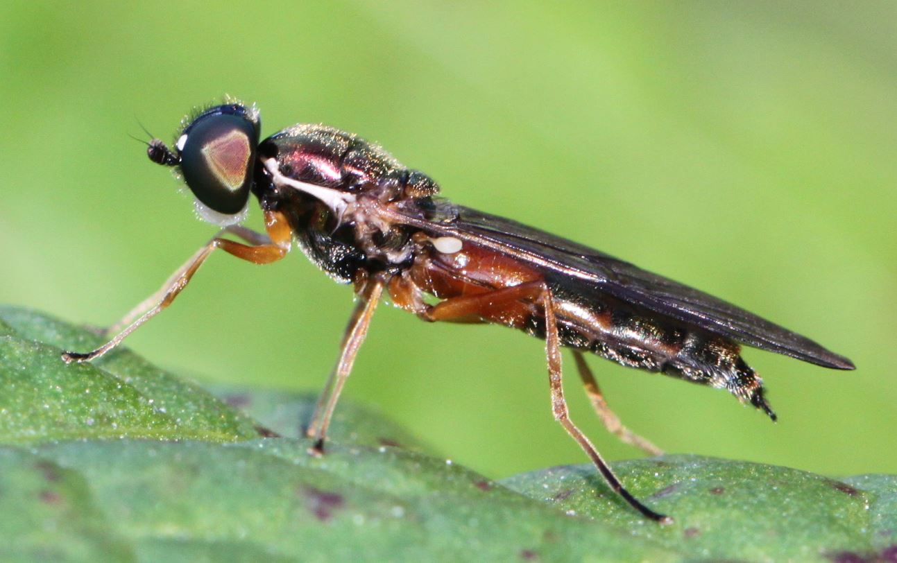 Waffenfliege Sargus bipunctatus am 29. September 2018 am Rande der Schwetzinger Hardt